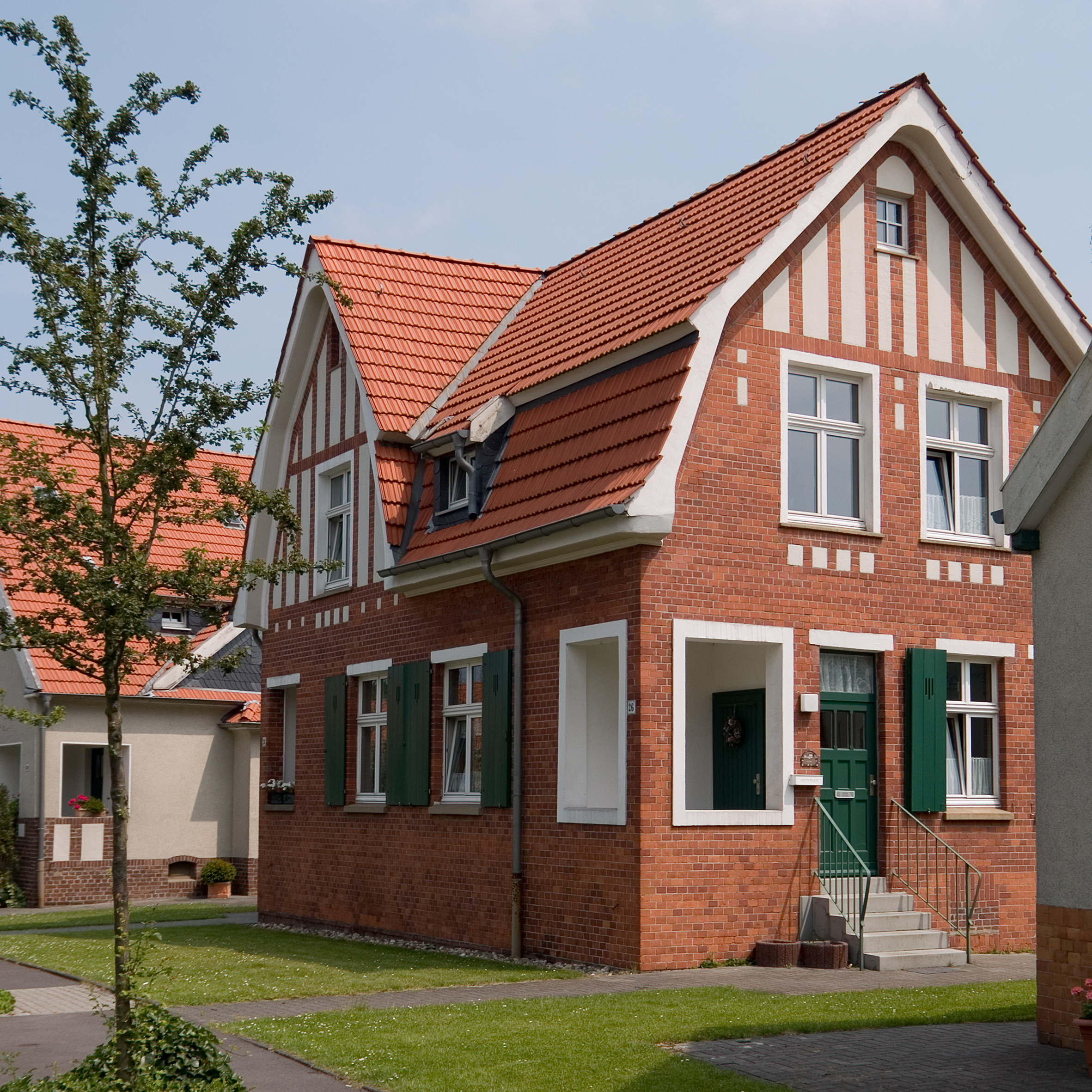 Herne, Gebäude in der Siedlung Teutoburgia.